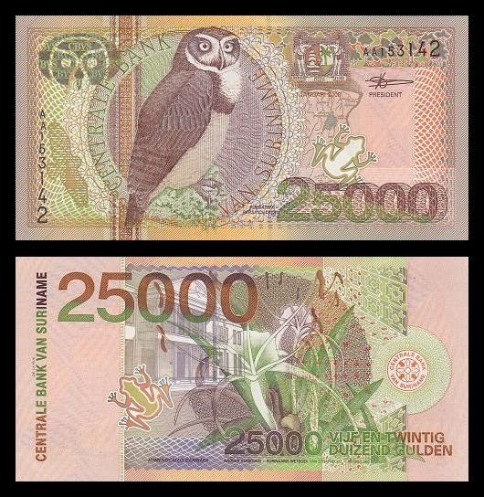 25.000 Fiorini surinamesi raffiguranti nel dritto il Pulsatrix perspicillata e nel fronteretro Hymenocallis caribaea.